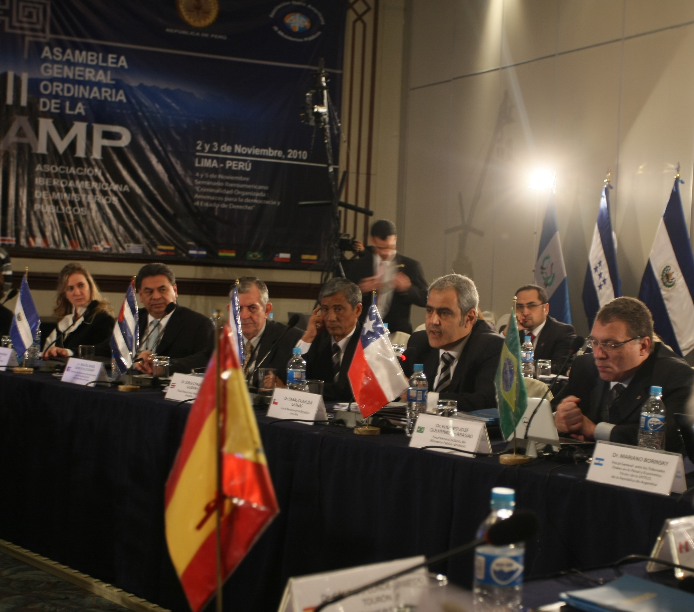 Intervención del Fiscal Nacional de Chile, Sabas Chahuán, en el Seminario sobre Criminalidad Organizada de la Asamblea de Lima.